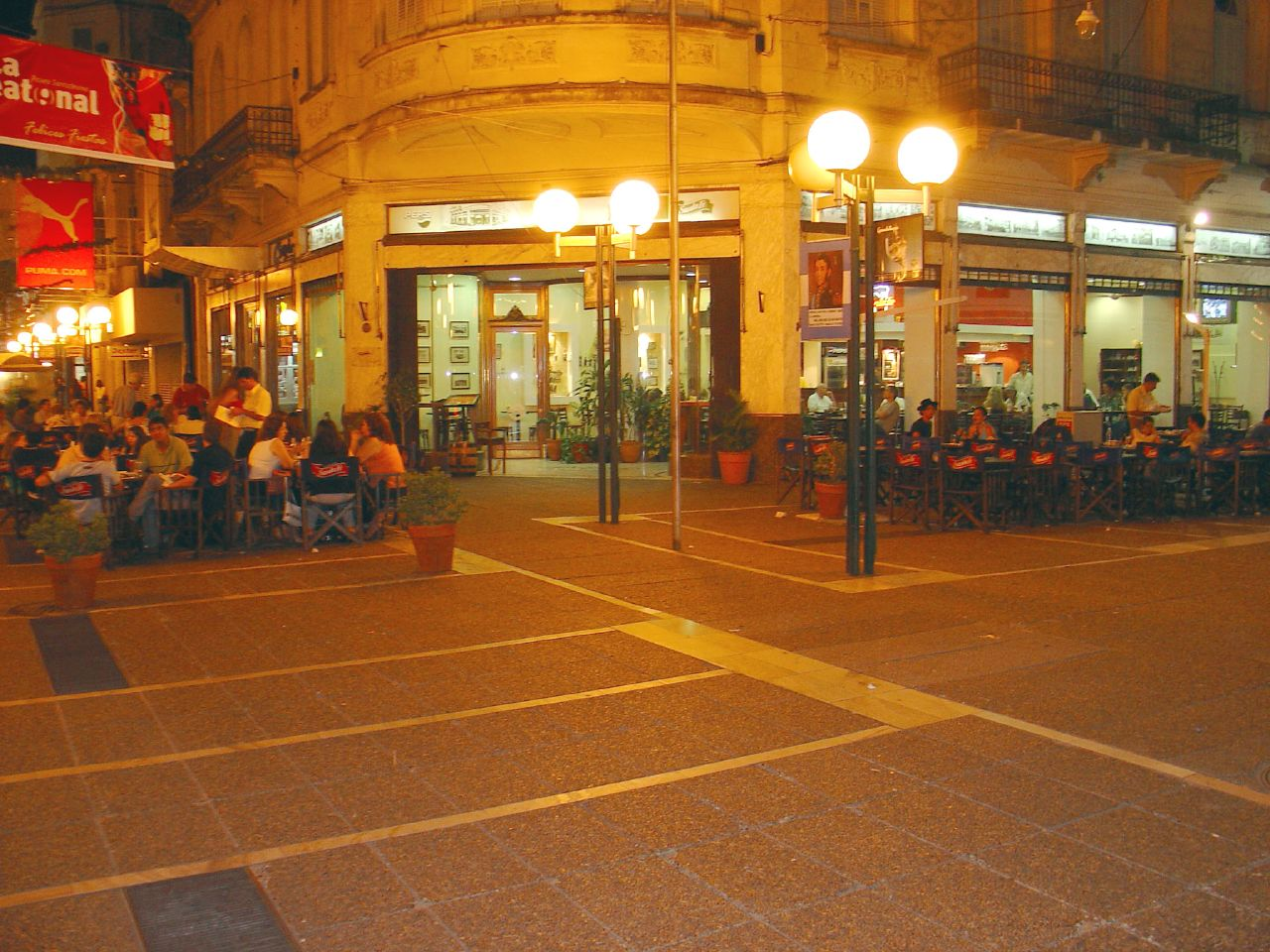 Pedestrian San Martín Street, Santa Fe, Argentina.